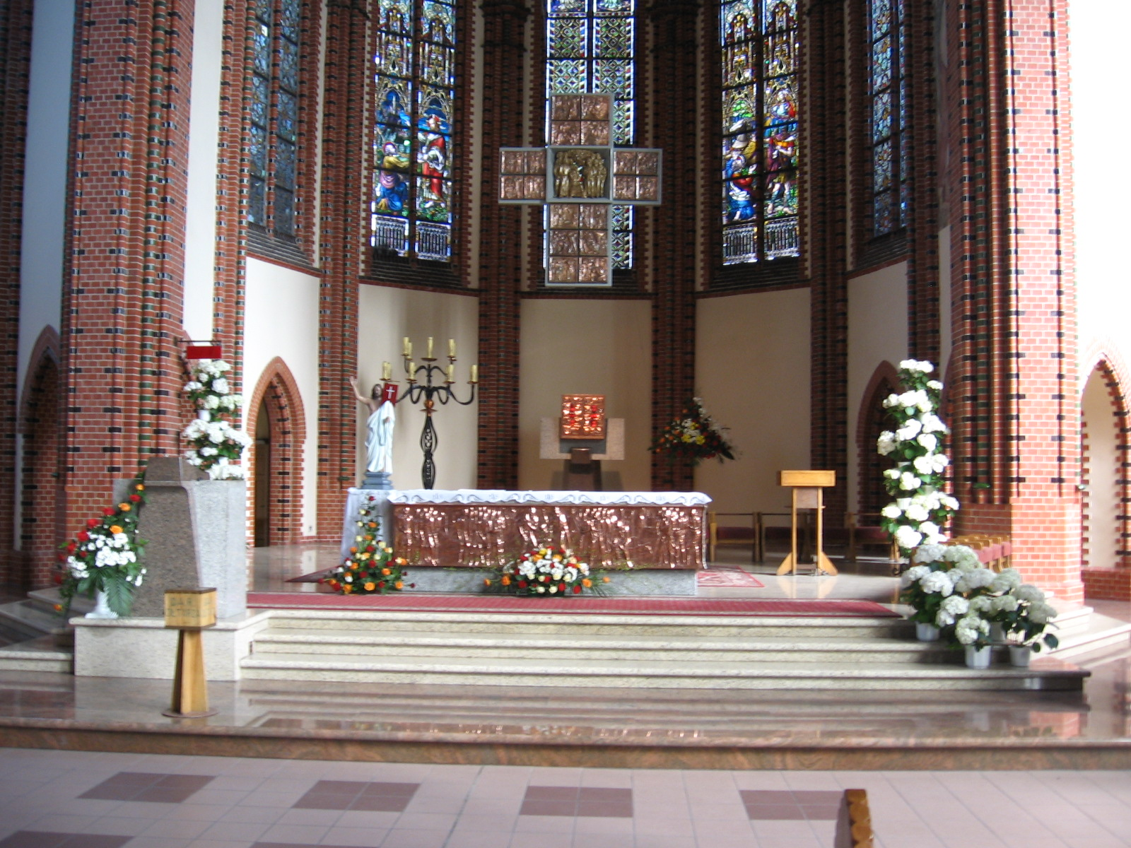 Kościół św. Piotra i Pawła w Katowicach (zhabytek nr rejestr. A/1483/92)